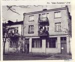 В началото на ХХ век